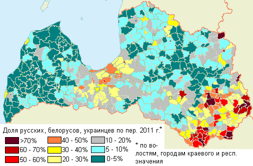 Суммарная процентная доля русских, белорусов, украинцев по переписи населения 2011 года. По волостям и городам Латвии.